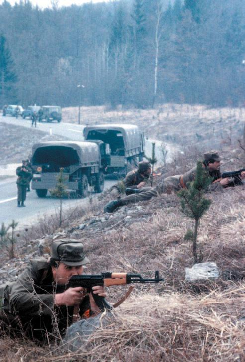 Vaja slovenske teritorialne obrambe Premik 91, ki je potekala Od 22. do 24. marca 1991. V vaji so sodelovale enote 2. Pokrajinskega štaba TO Dolenjske pokrajine in 6. Pokrajinskega štaba TO Severnoprimorske pokrajine ter specialna brigada MORIS.